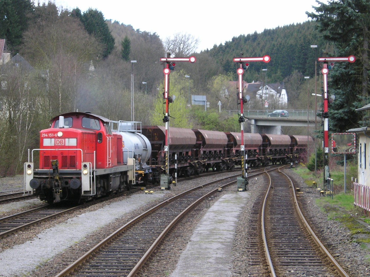 294 151-6 fährt am 2005-04-07 mit einem Güterzug in den Bahnhof Brügge (Westf.) ein